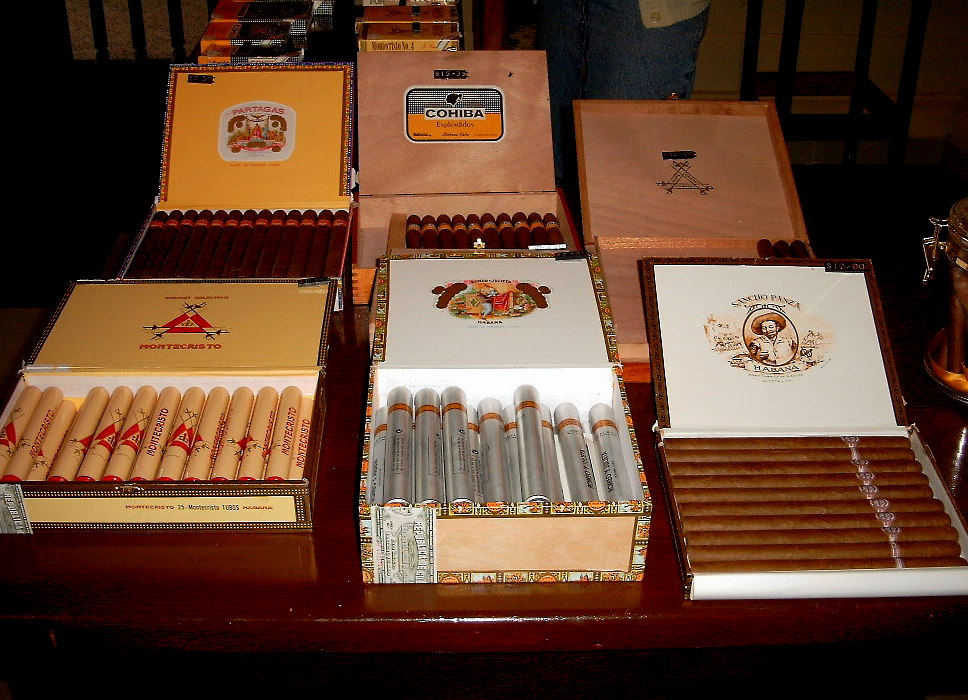 Zigarren, Cuba